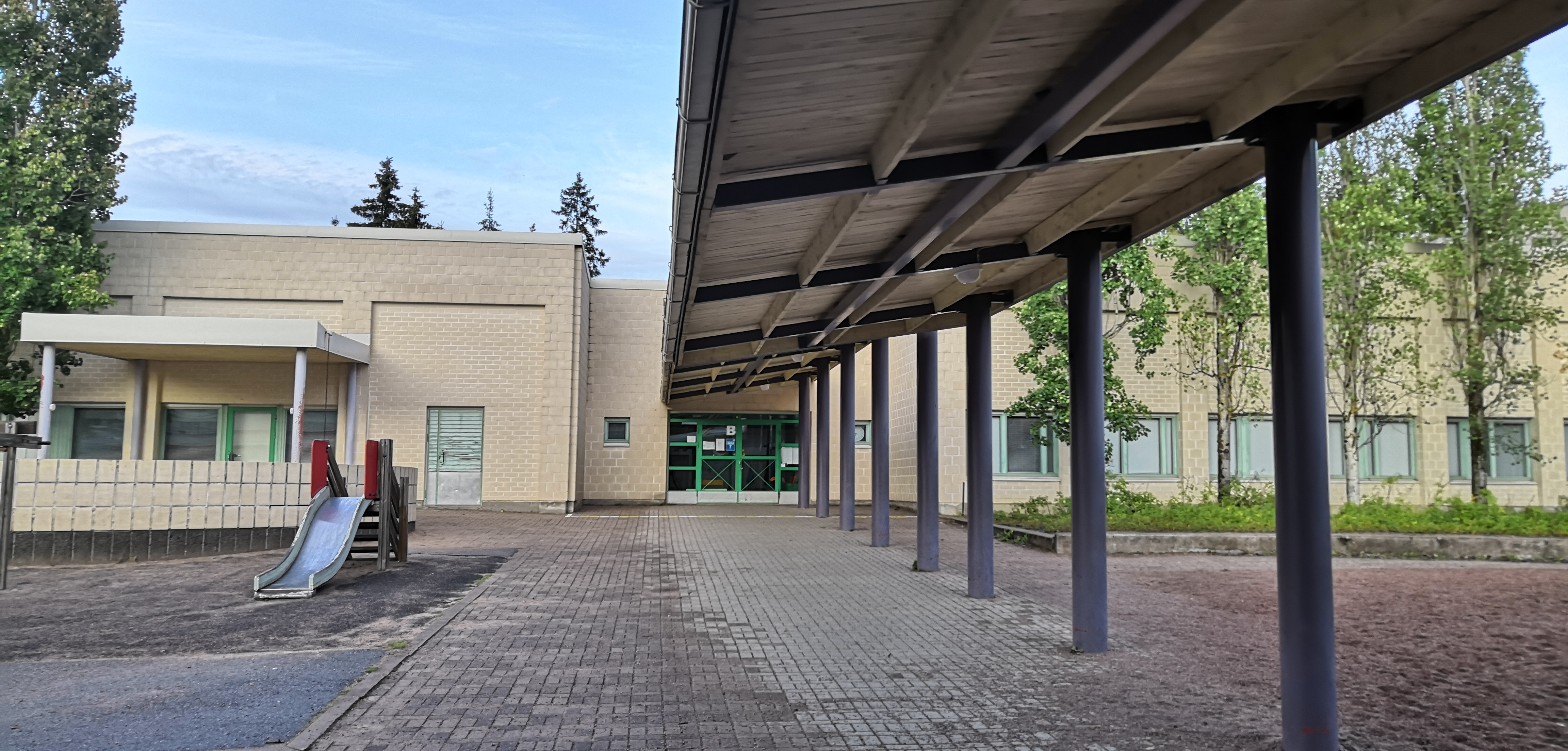 Vahtero koulun B-sisäänkäynti